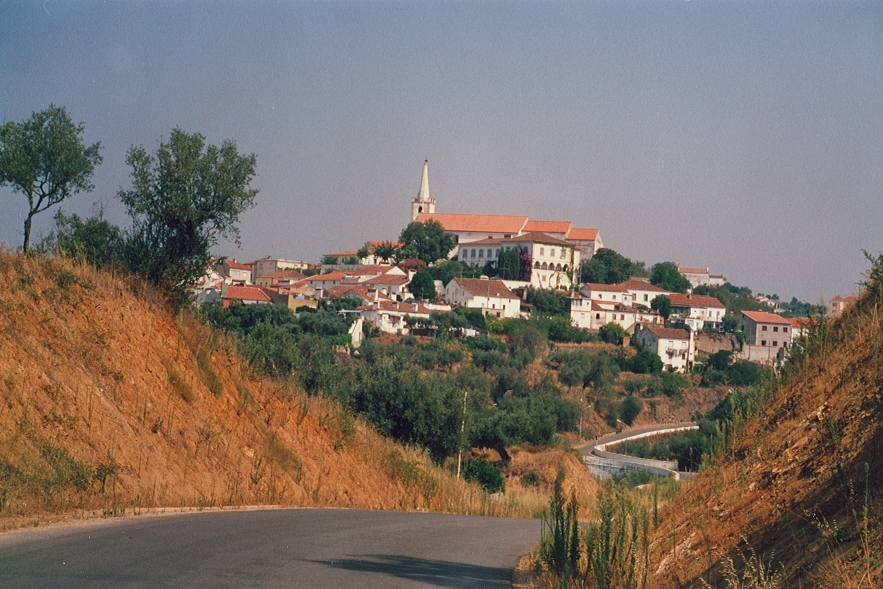 Sardoal